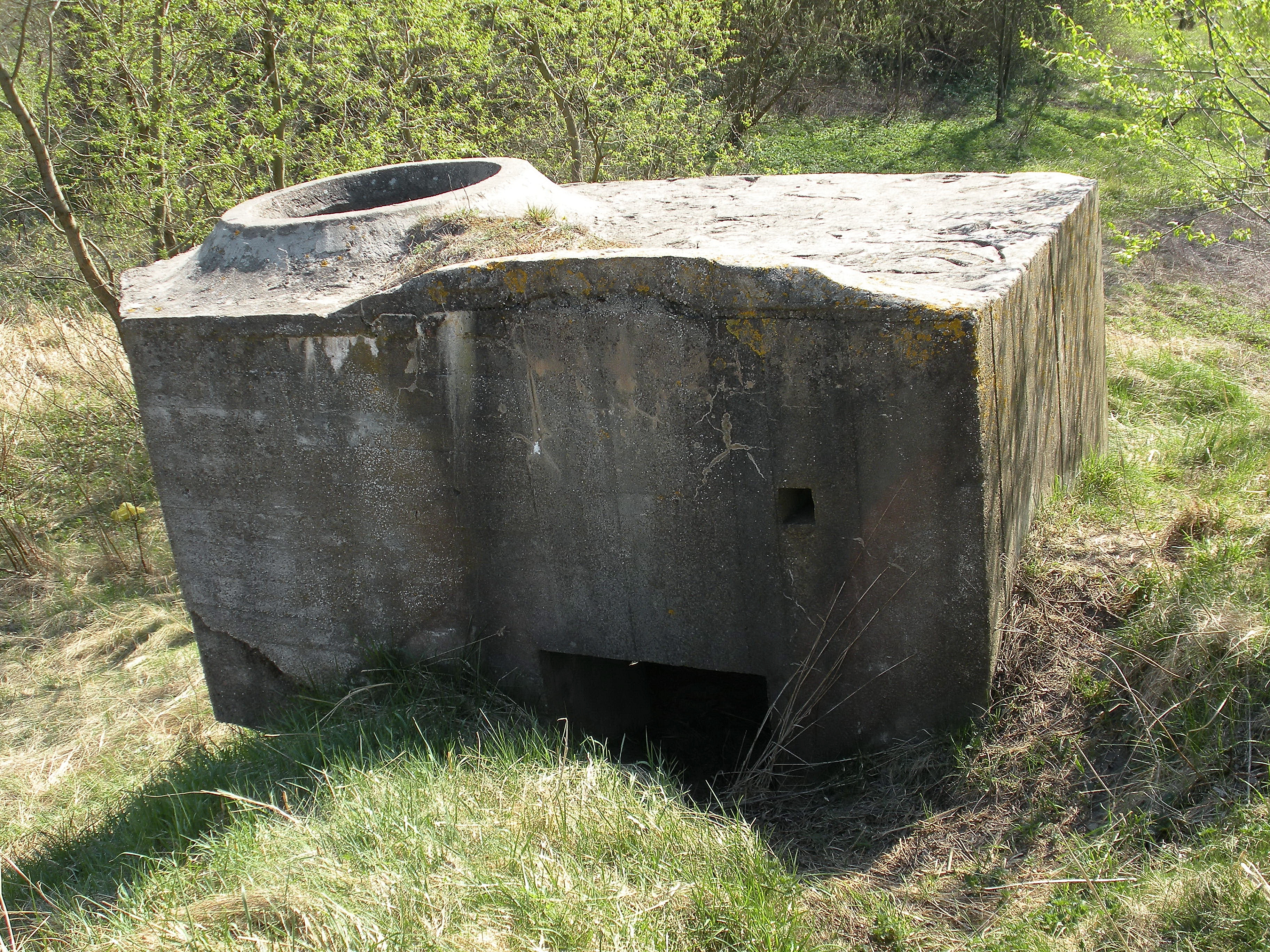 Ringstand in Liepaja, Latvia